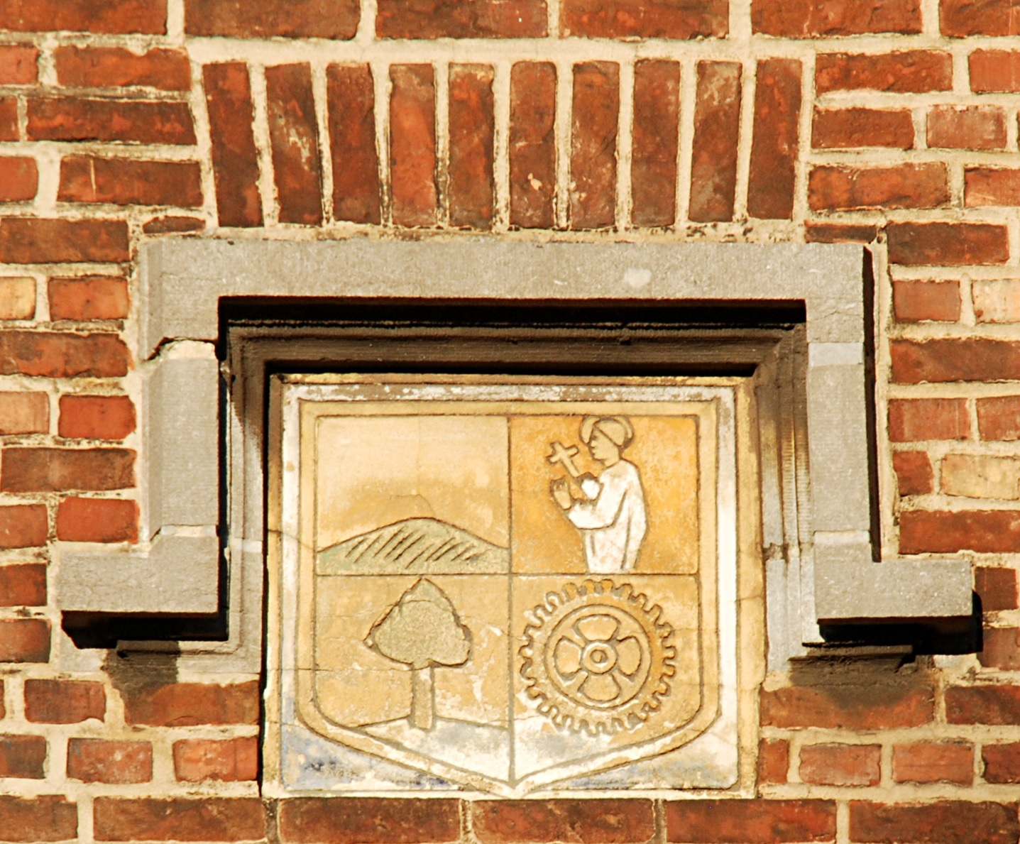 Belgique - Brabant wallon - Court-Saint-Étienne - Gare